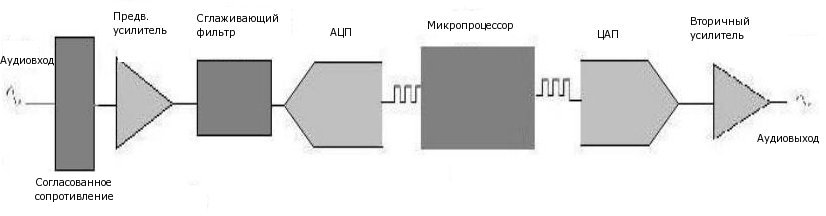 Блок-схема цифрового слухового аппарата